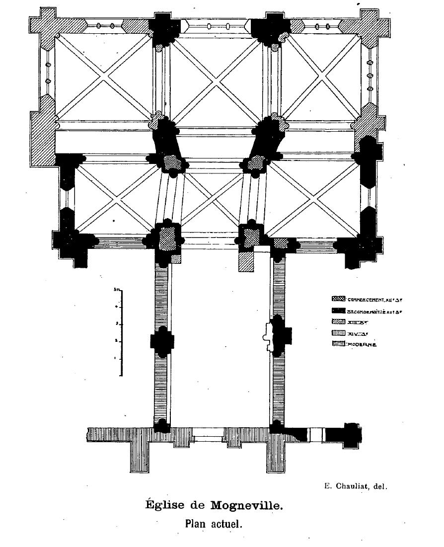 Plan des masses de l'église dans son état actuel.